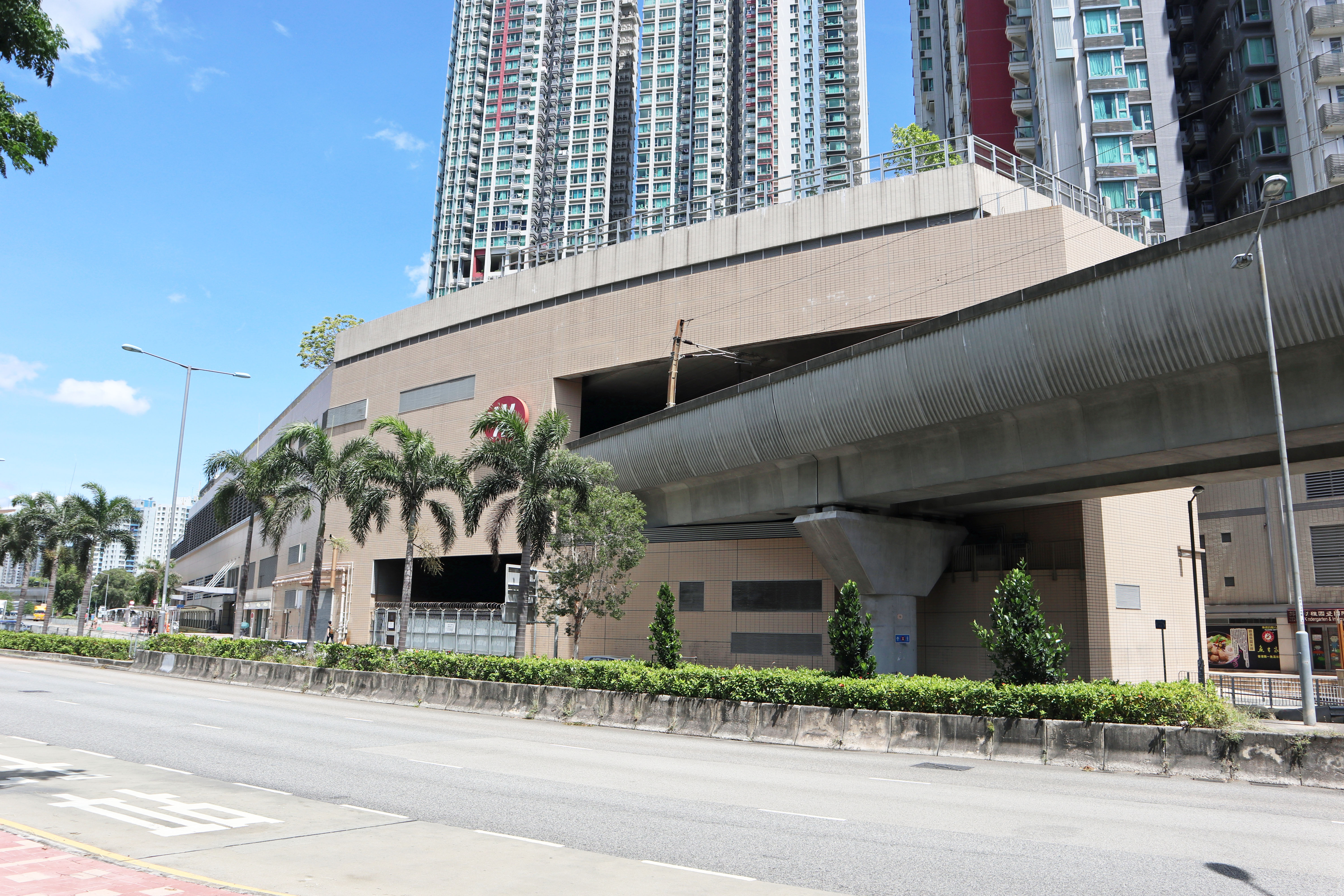 港鐵車公廟站外觀